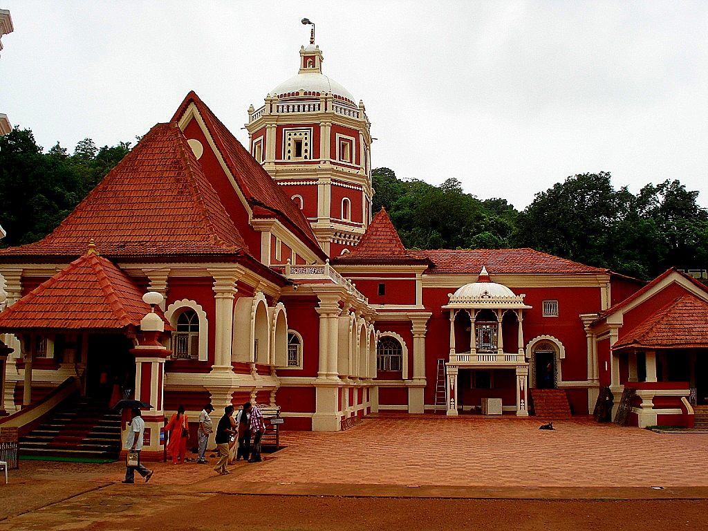 This temple is dedicated to the Goddess of peace, has a pagoda like structure and a roof made of long slabs of stone. The annual carnival held here is well worth attending to see the blend of christian and hindu cultures.